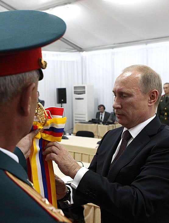 Владимир Путин и Эмомали Рахмон в расположении 201-й российской военной базы, находящейся в Таджикистане. Вручение ордена Жукова